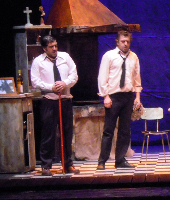 Víctor Mosqueira e Evaristo Calvo (Mofa e Befa) na representación da obra Oeste solitario, no Pazo da Cultura de Pontevedra